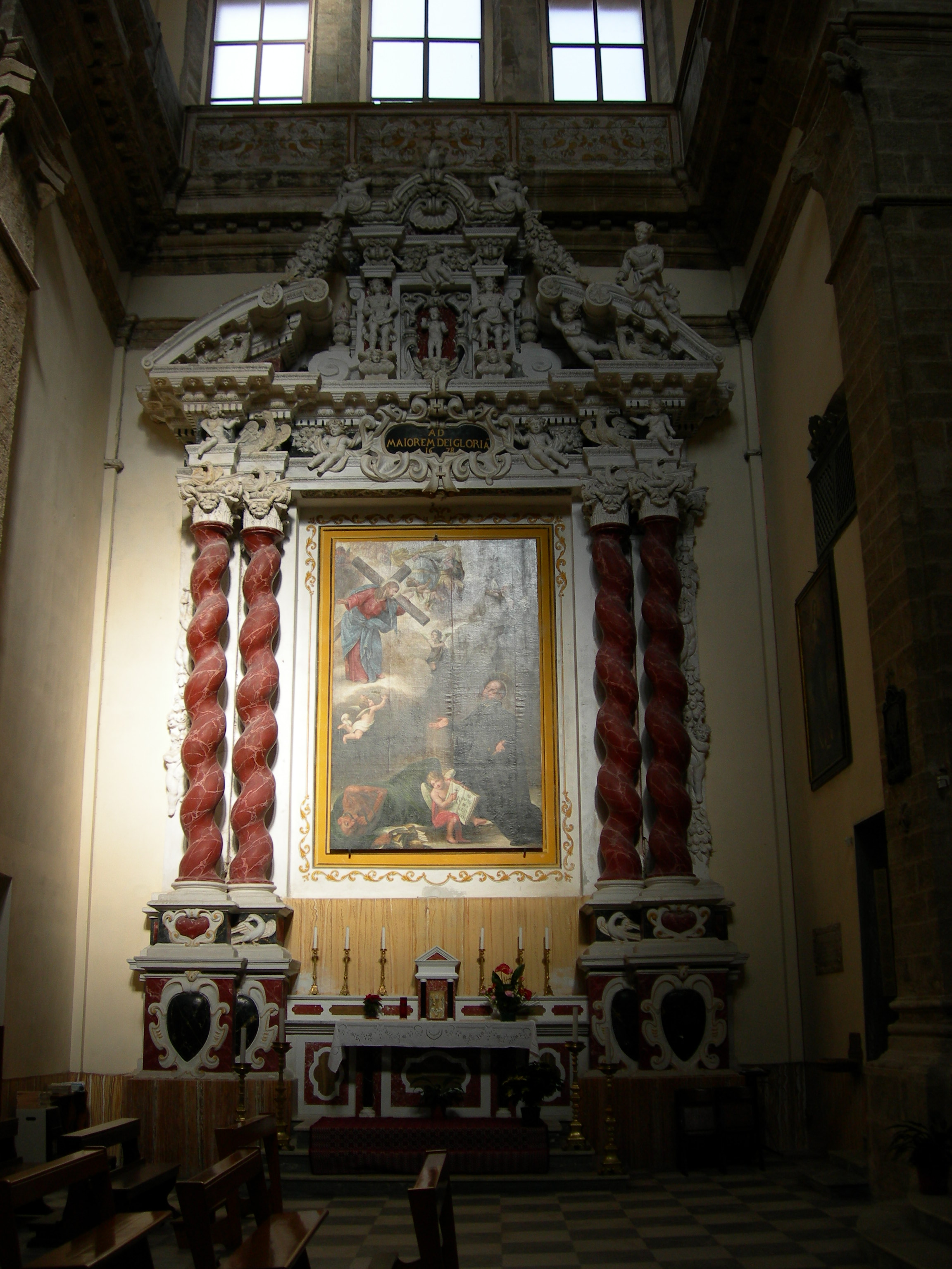 Altare laterale transetto sinistro, chiesa di San Michele, Alghero, Italy.